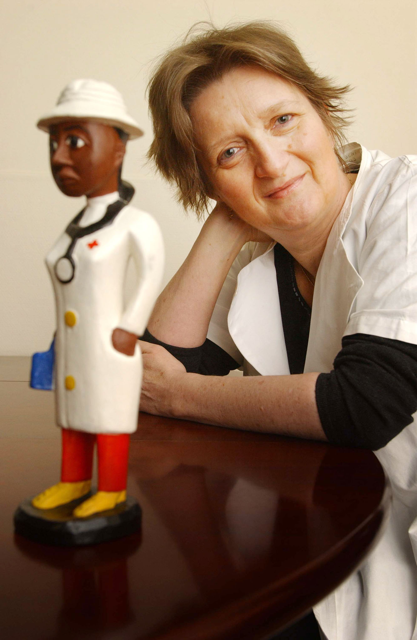 Marleen Temmerman, Vlaamse gynaecologe, hoogleraar en politica.